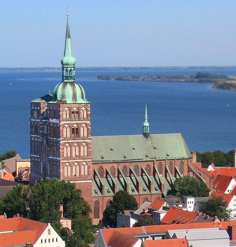 Beschreibung: St. Nikolai Kirche von der Marienkirche aus betrachtet Fotograf: Darkone, 10. September 2004